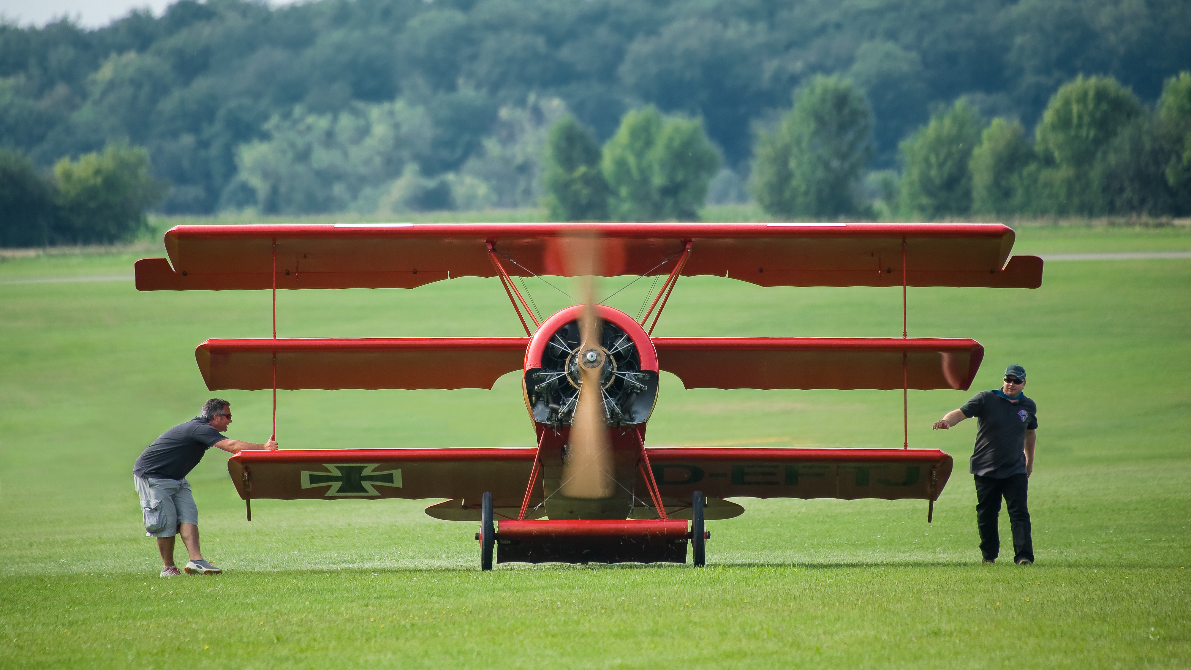 Dieses Foto wurde beim Oldtimer Fliegertreffen, 2013 am Flugfeld Hahnweide bei Kirchheim unter Teck aufgenommen. Es zeigt eine Fokker DR.1 Replika.